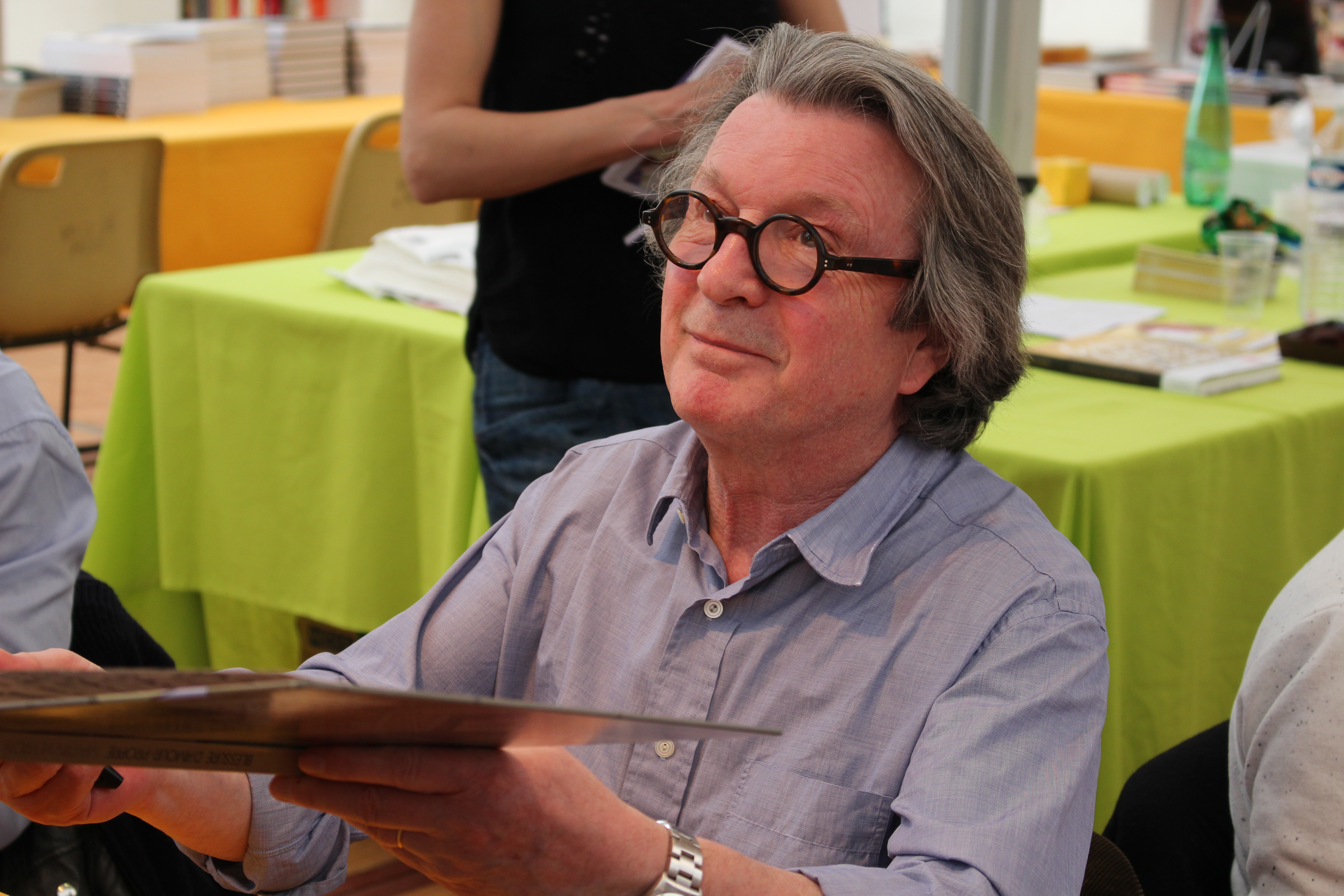 Martin Veyron au Festival Le Livre à Metz, le 22 avril 2016.